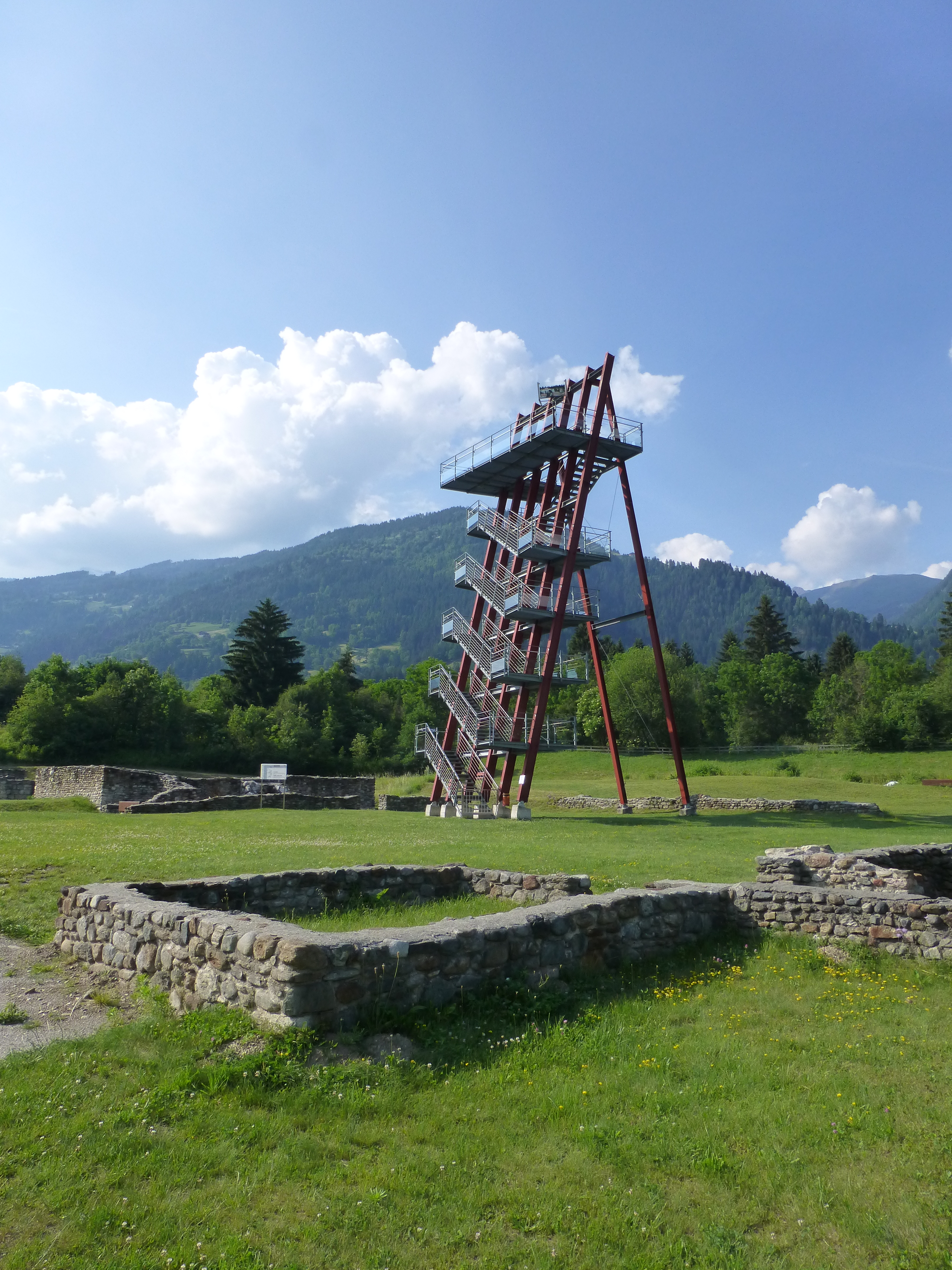 Aussichtsturm Aguntum, Blick in nördliche Richtung